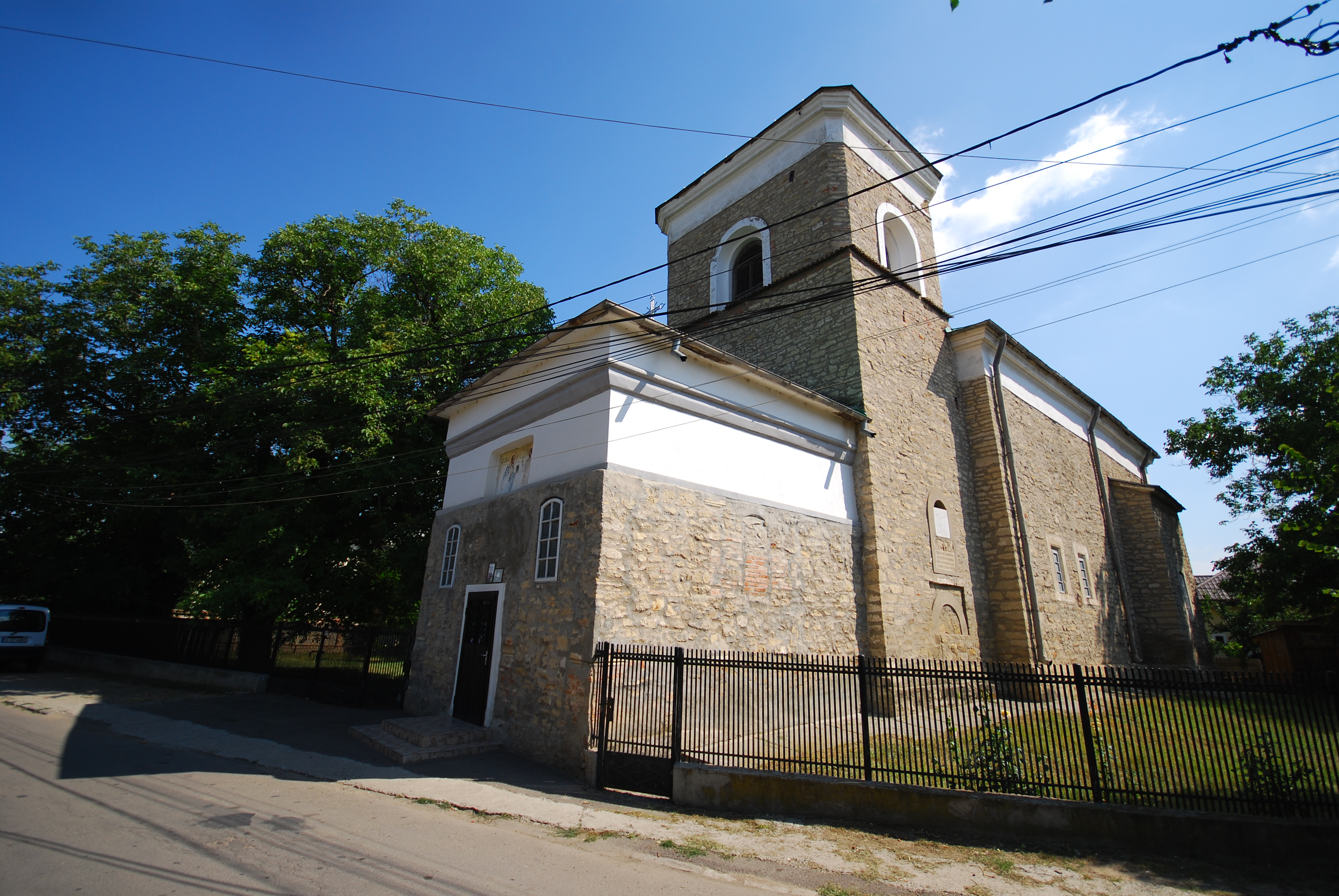 Biserica "Sf. Ioan Gură de Aur" cu mormântul lui Barbu Lăutarul